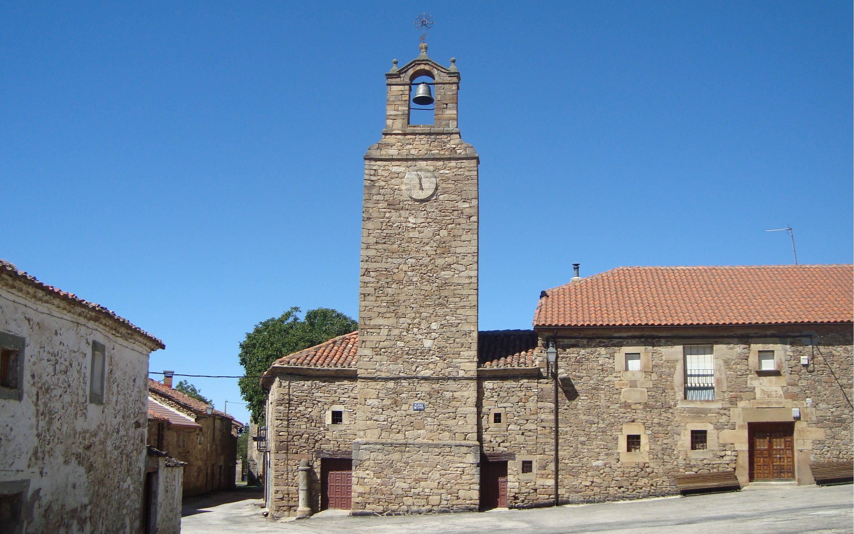 Plaza Mayor - Torre del Reloj